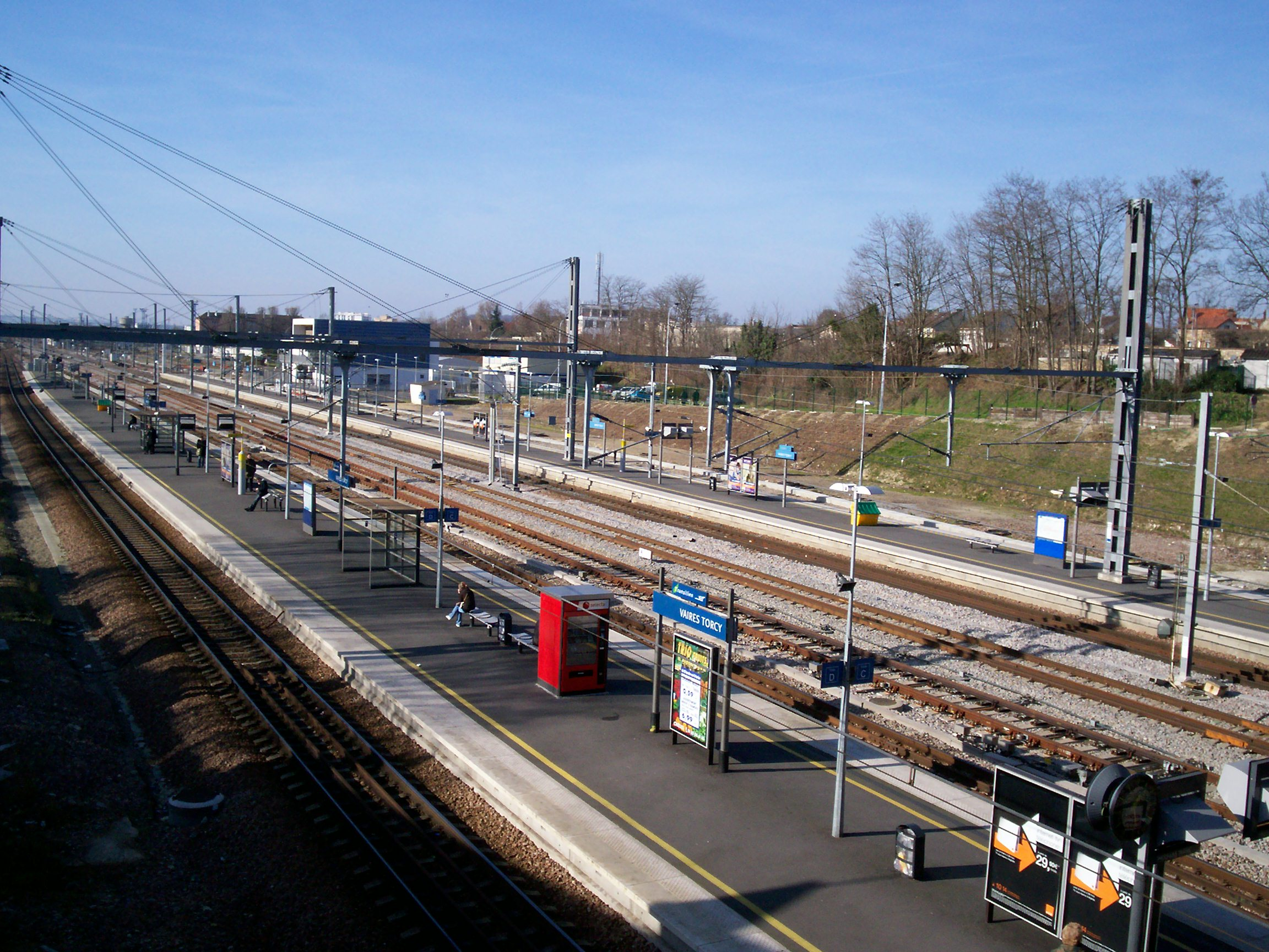 Vue aérienne de la gare de Vaires